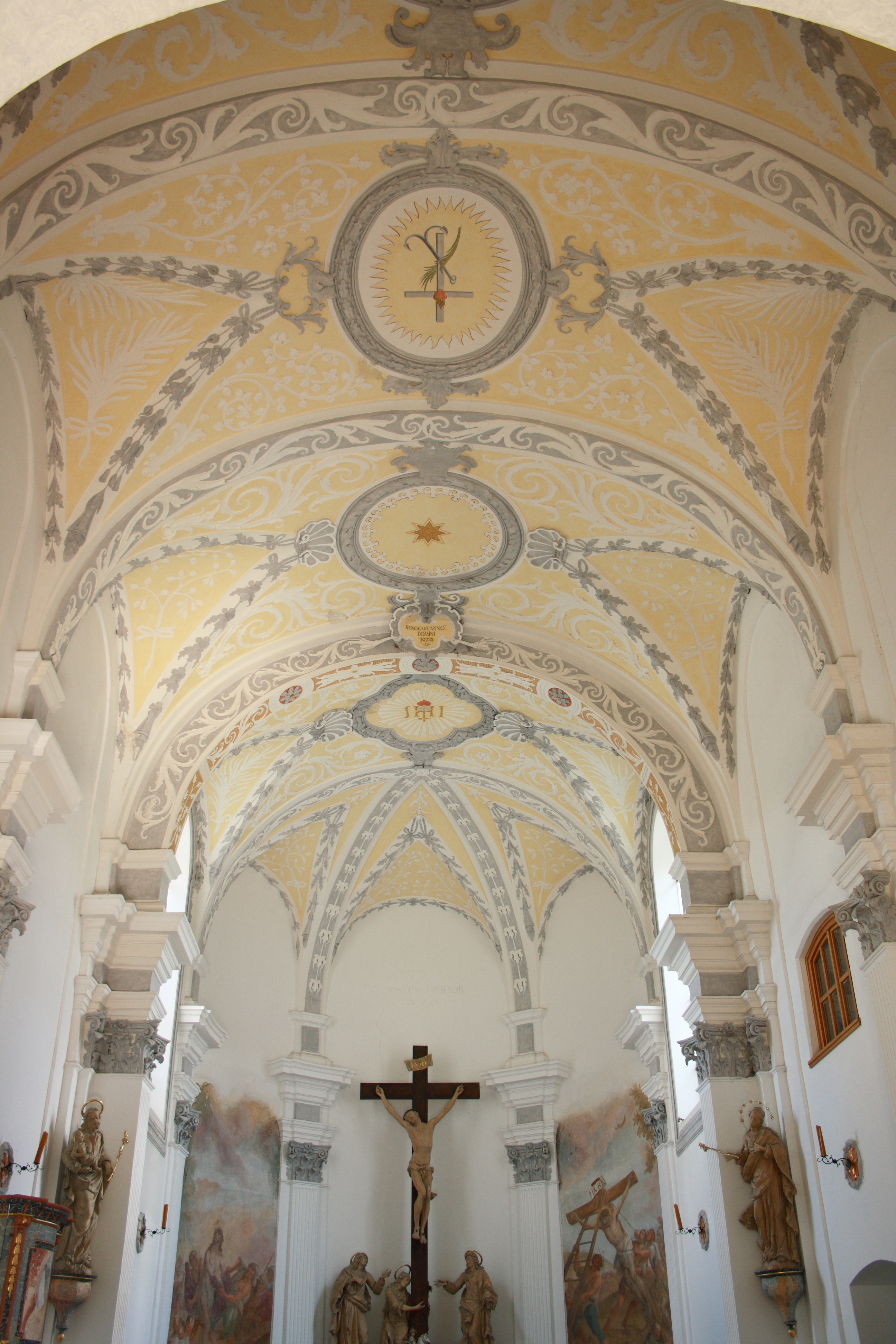 Katholische Kirche St. Matthias und Georg, Schloss Scherneck in Rehling, einer Gemeinde im Landkreis Aichach-Friedberg (Bayern), 1702 bis 1709 erbaut, barocke Stuckdecke